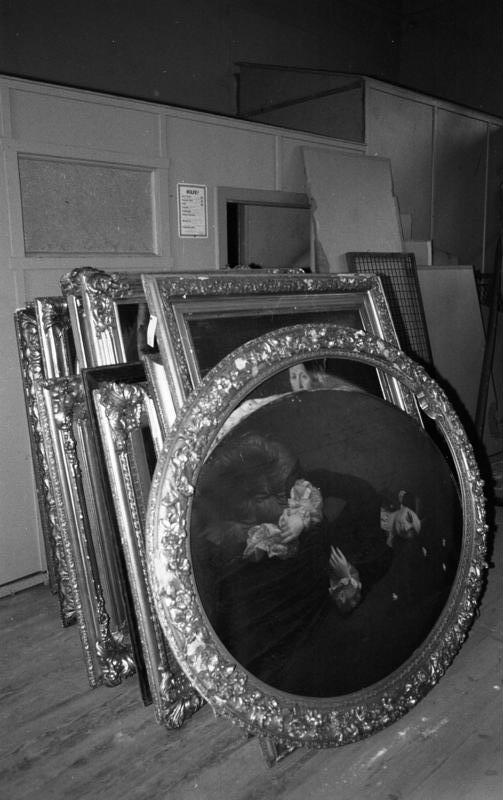 ADN-ZB / Grimm / 6.12.89 / Bez. Potsdam: Kunstgegenstände 298 Gemälde, Zeichnungen, Grafiken und Fotografien aus einem Lager der Kunst & Antiquitäten GmbH in Mühlenbeck sollen in diesen Tagen in den Bestand der Staatlichen Kunstsammlung Dresden zurückkehren. Nicht mehr zurückgeführt werden können weitere 372 Gemälde, die inzwischen für Devisen verkauft wurden. Diese Kunstgegenstände minderen Wertes gehören zu den sogenannten "Schloßbergungsbeständen", die in Moritzburg und Pillnitz lagerten. Die Gemälde sind stark beschädigt, teilweise zerstochen, haben Einschüsse und sind einzeln nicht verkäuflich.